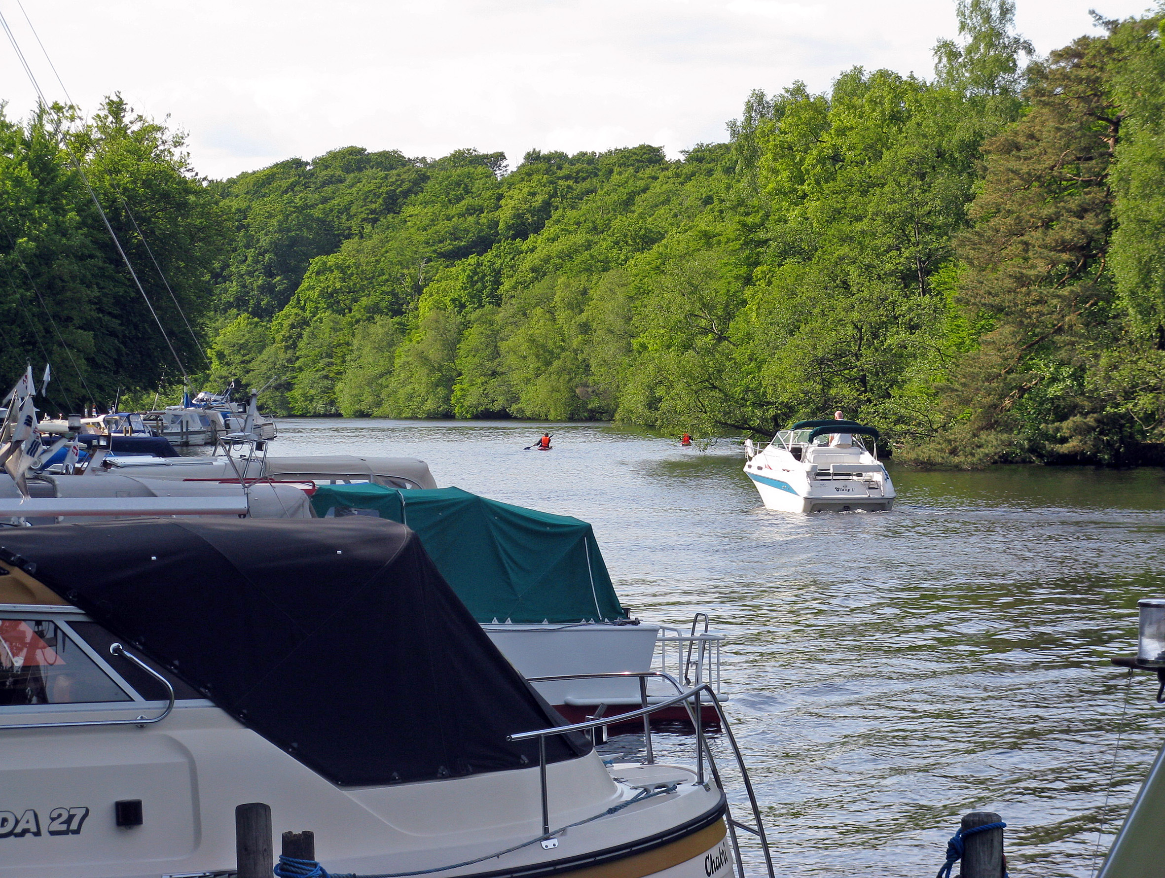 Remstrup Å del af Gudenå